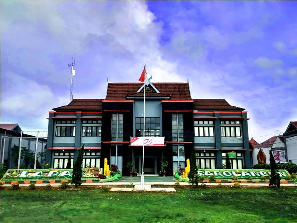 Foto Bangunan Gedung 1 Lapas Sarolangun